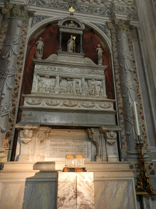 Brescia - Arca dei Ss. Apollonio e Filastrio, opera rinascimentale del 1510, all'interno del Duomo